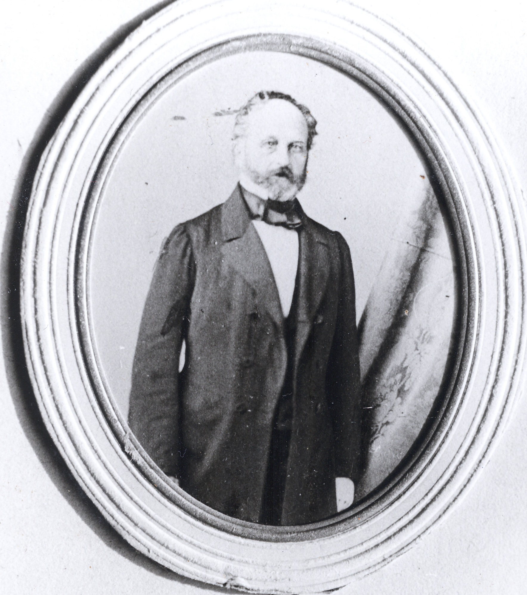 Julius Pinder, 1805-1867, Oberpräsident der preußischen Provinz Schlesien